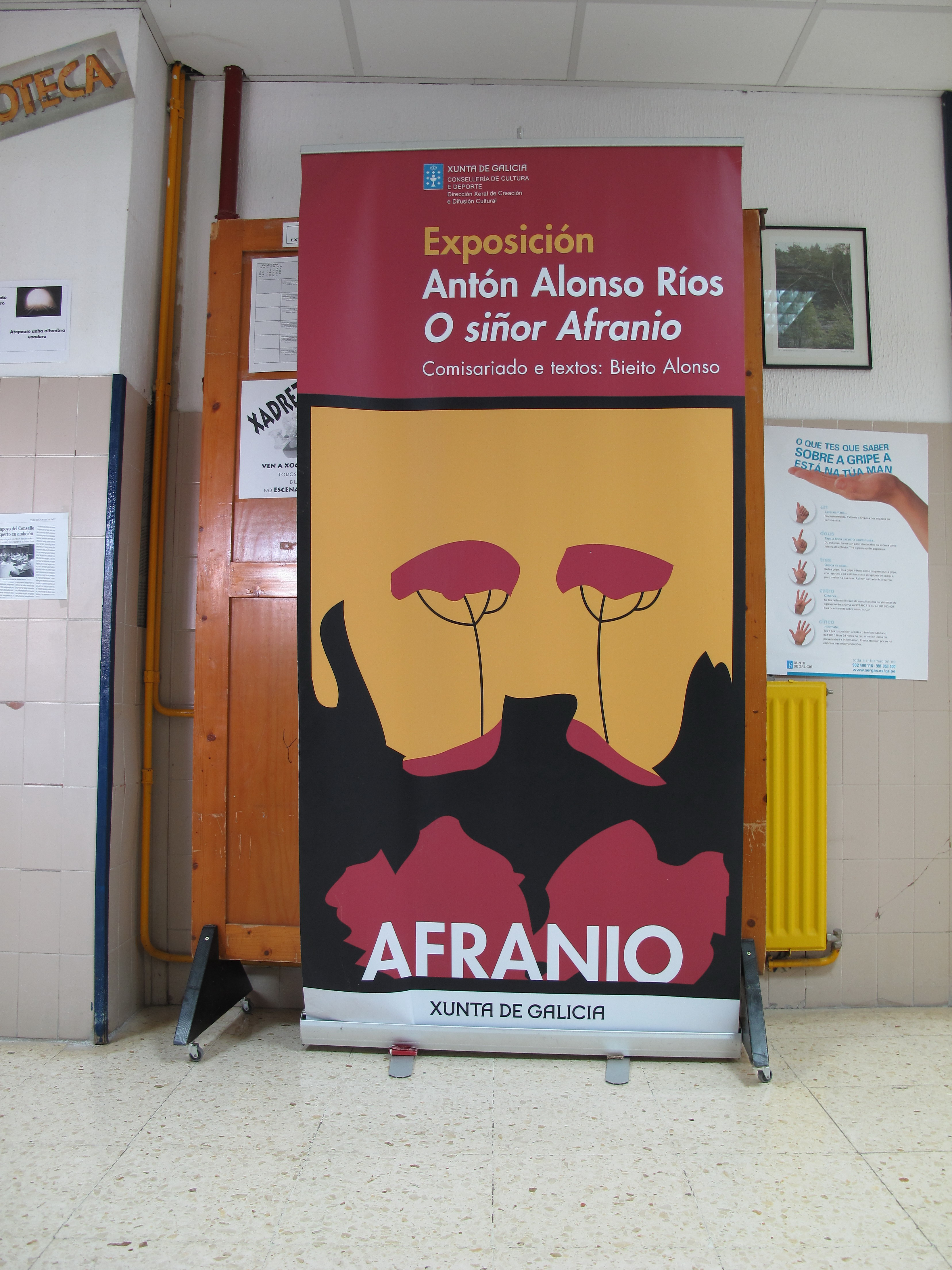 Exposición sobre Antón Alonso Ríos no IES Manuel García Barros d a Estrada